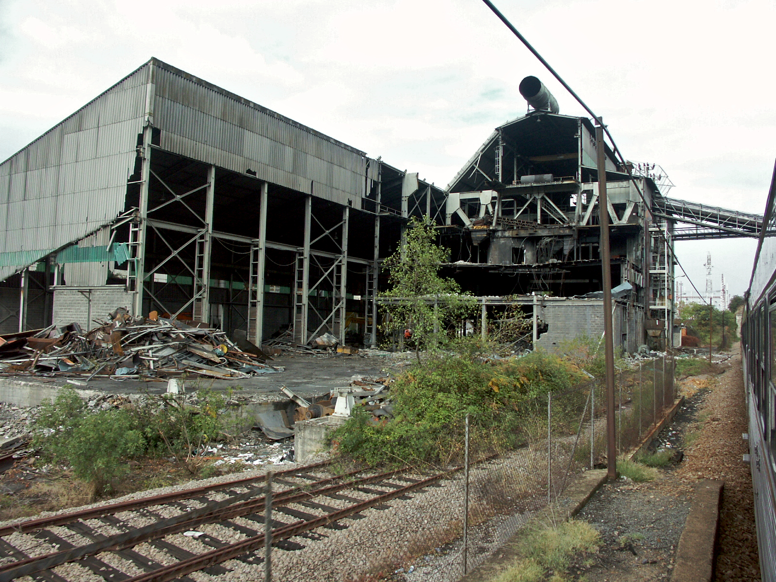 a bordo do InterRegional 861. Via férrea: Ramal inserido ao Km 107,595 [Linha do Douro, PK 107] Local: Bagaúste (Régua) Data e hora: 19 de Agosto de 2006 [09h24] Sentido: Ermesinde ruínas da unidade industrial Milnorte (link 1, link 2, link 3).